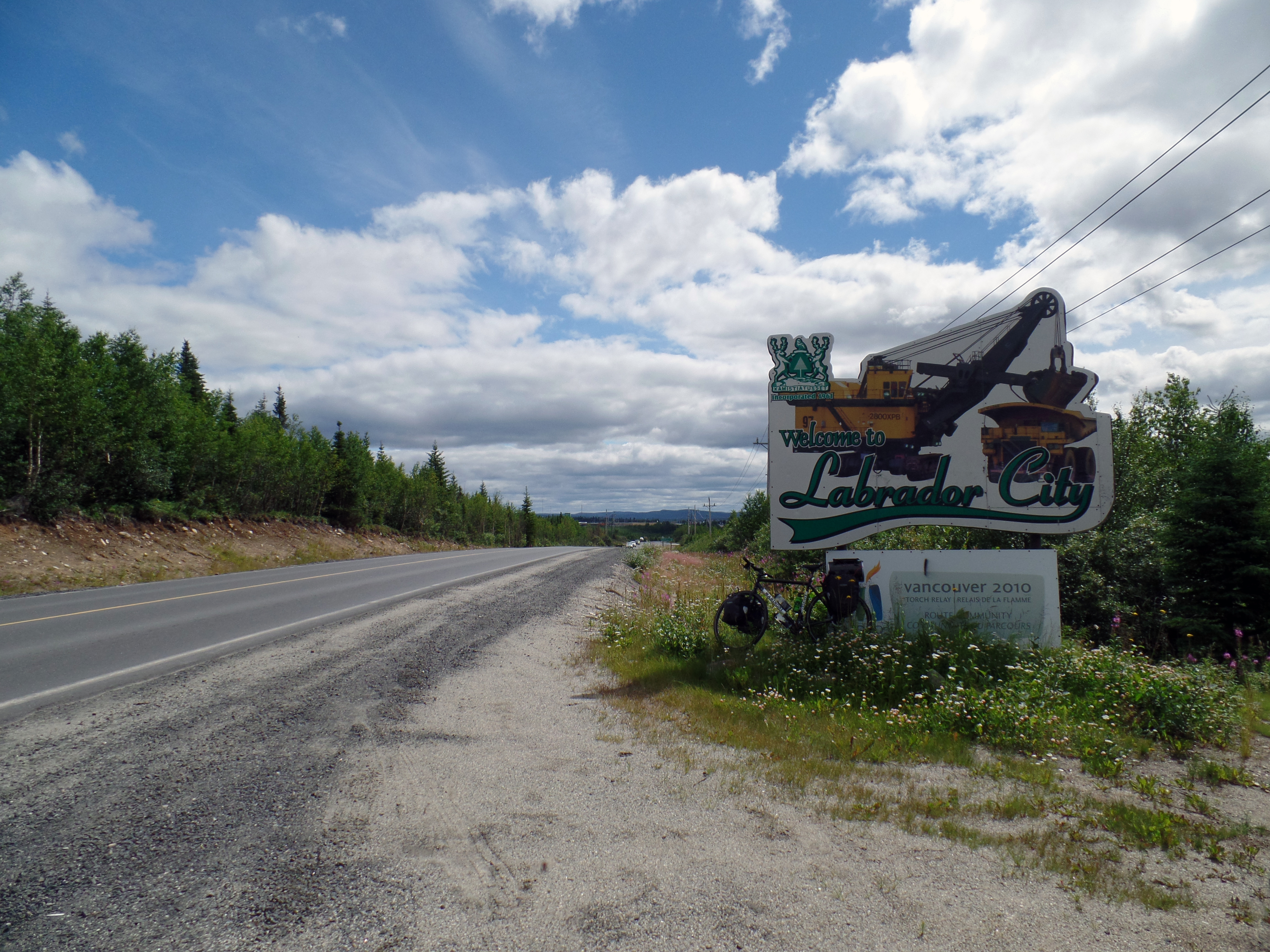 Route 500 à la sortie ouest de Labrador City